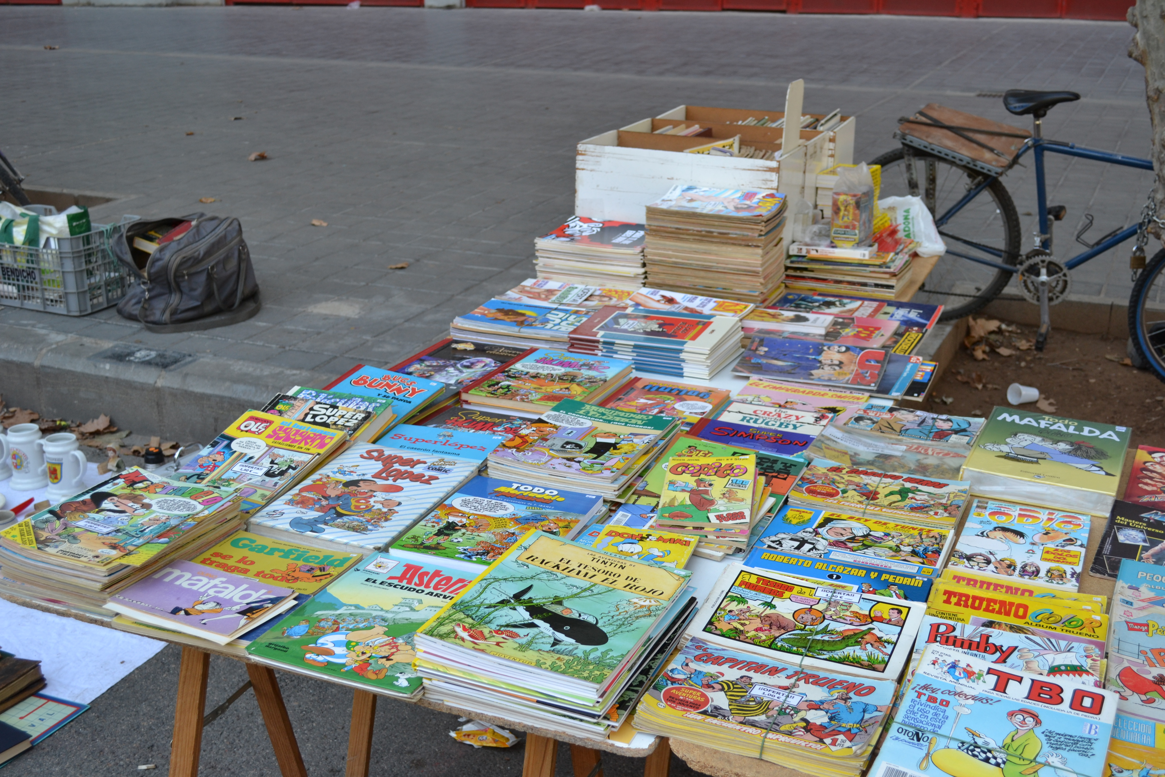 Historietas (cómics) en el Rastro en la Plaça de Lluís Casanova